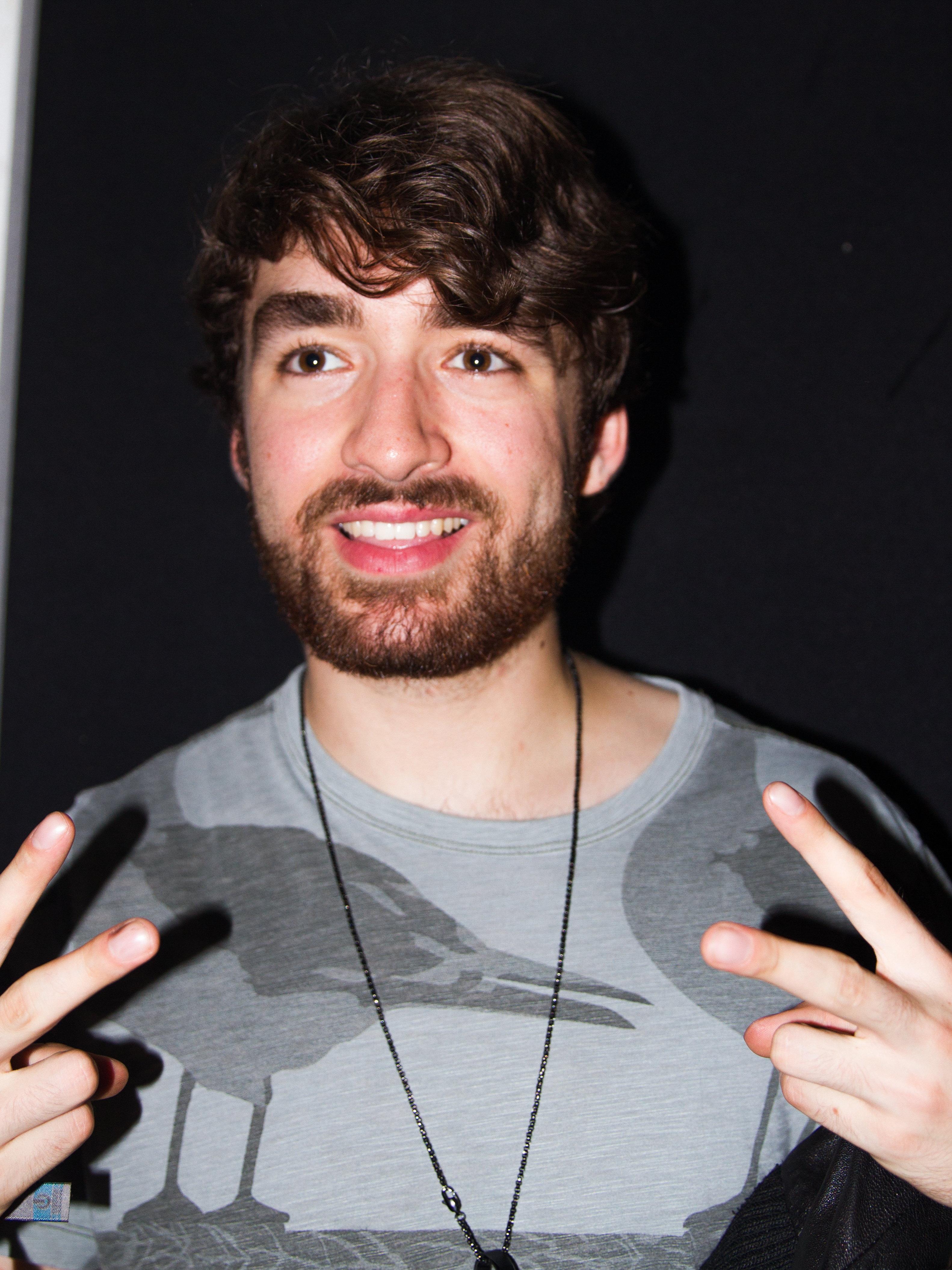 Oliver Heldens beim 14. Airbeat-One Dance Festivals das vom 16. bis 19. Juli 2015 auf dem Flugplatz Neustadt-Glewe stattfand.